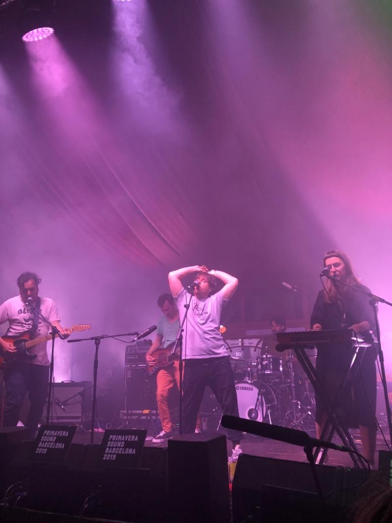 107 Faunos en el Primavera Sound 2019